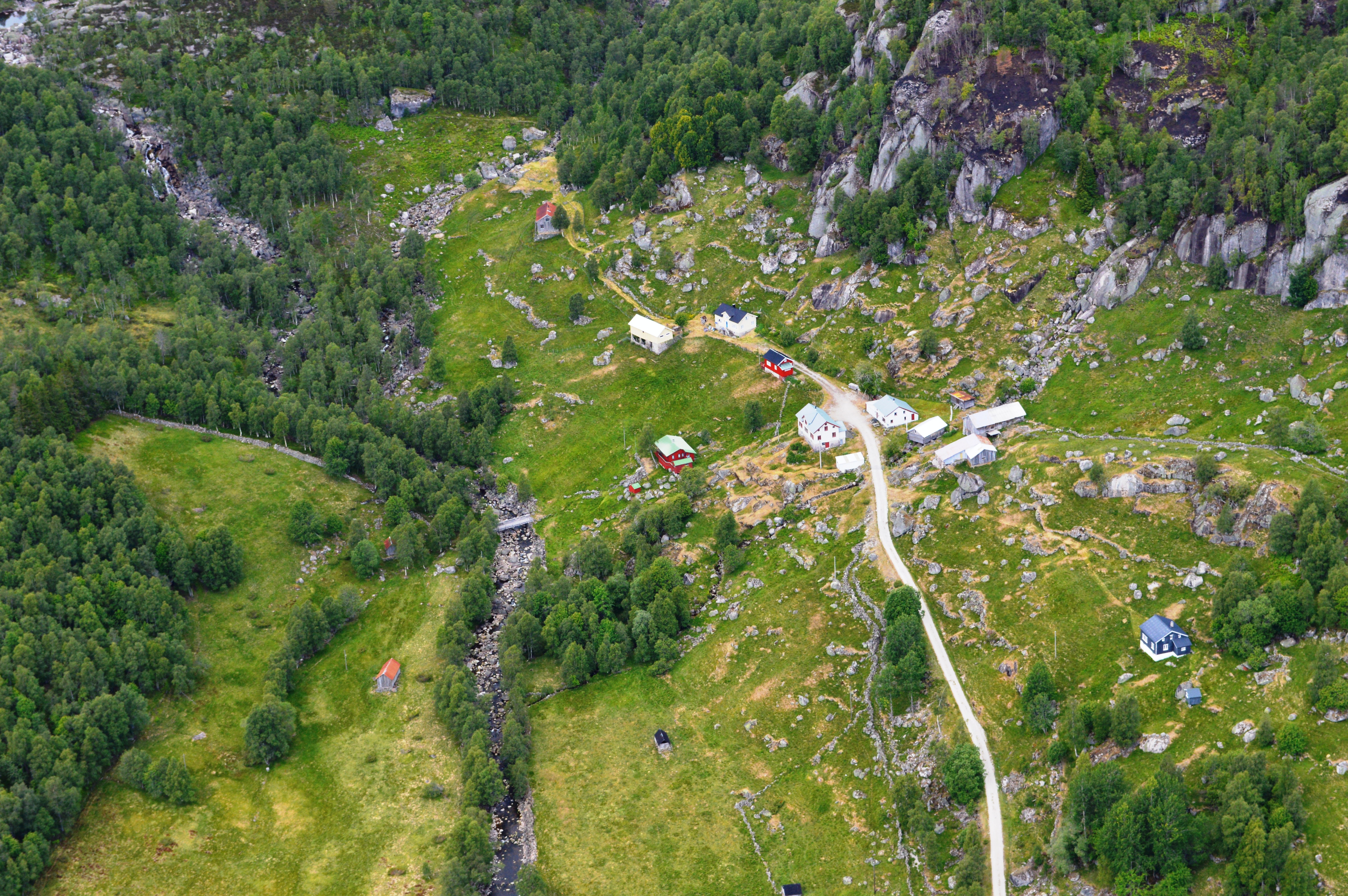 Flyfoto av gården Salmeli i Kvinesdal